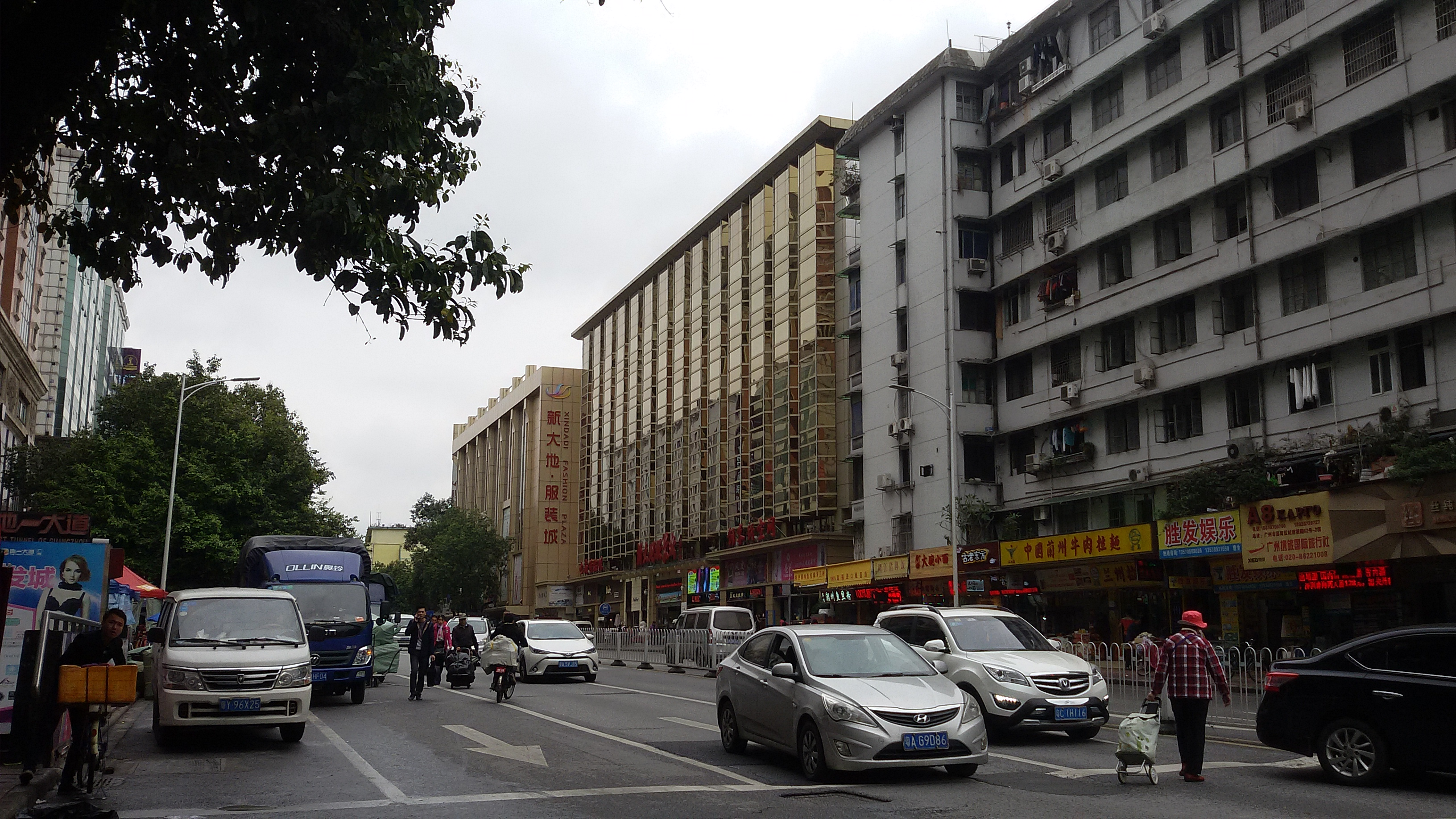 粵語: 新大地服裝城